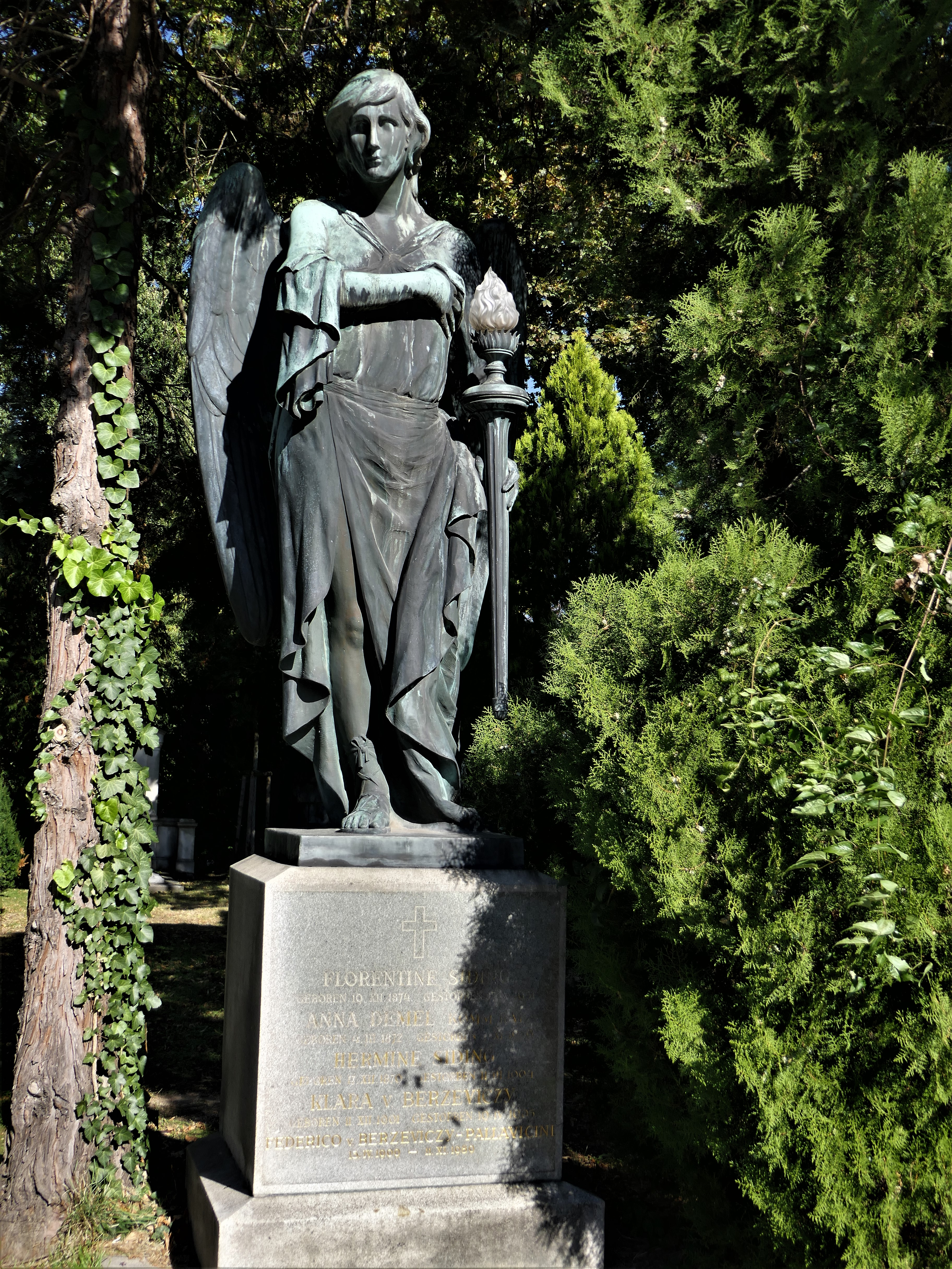 Familiengrab der Familie Demel mit Anna Demel und Friedrich Ludwig Berzeviczy-Pallavicini auf dem Wiener Zentralfriedhof